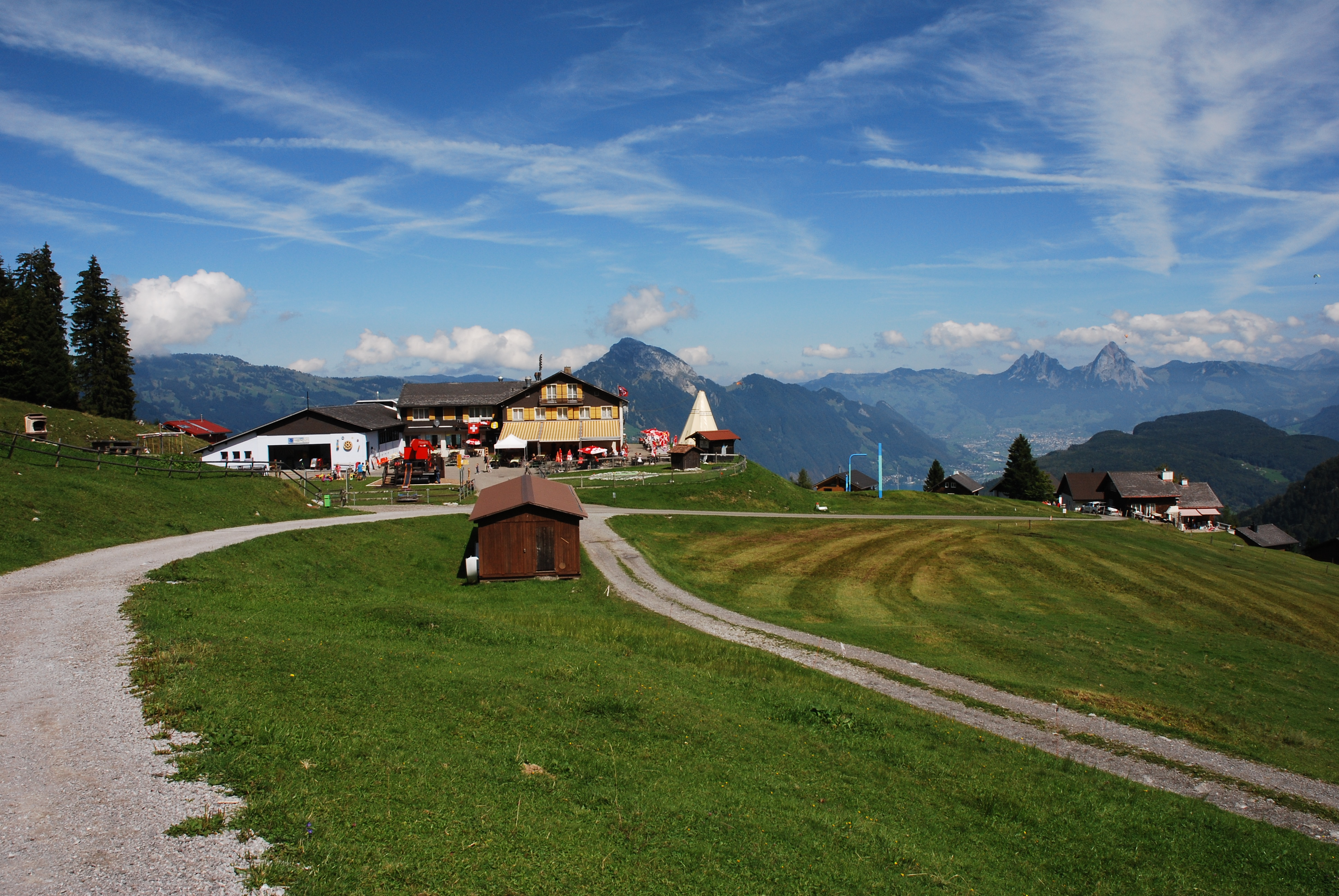 Stockhütte